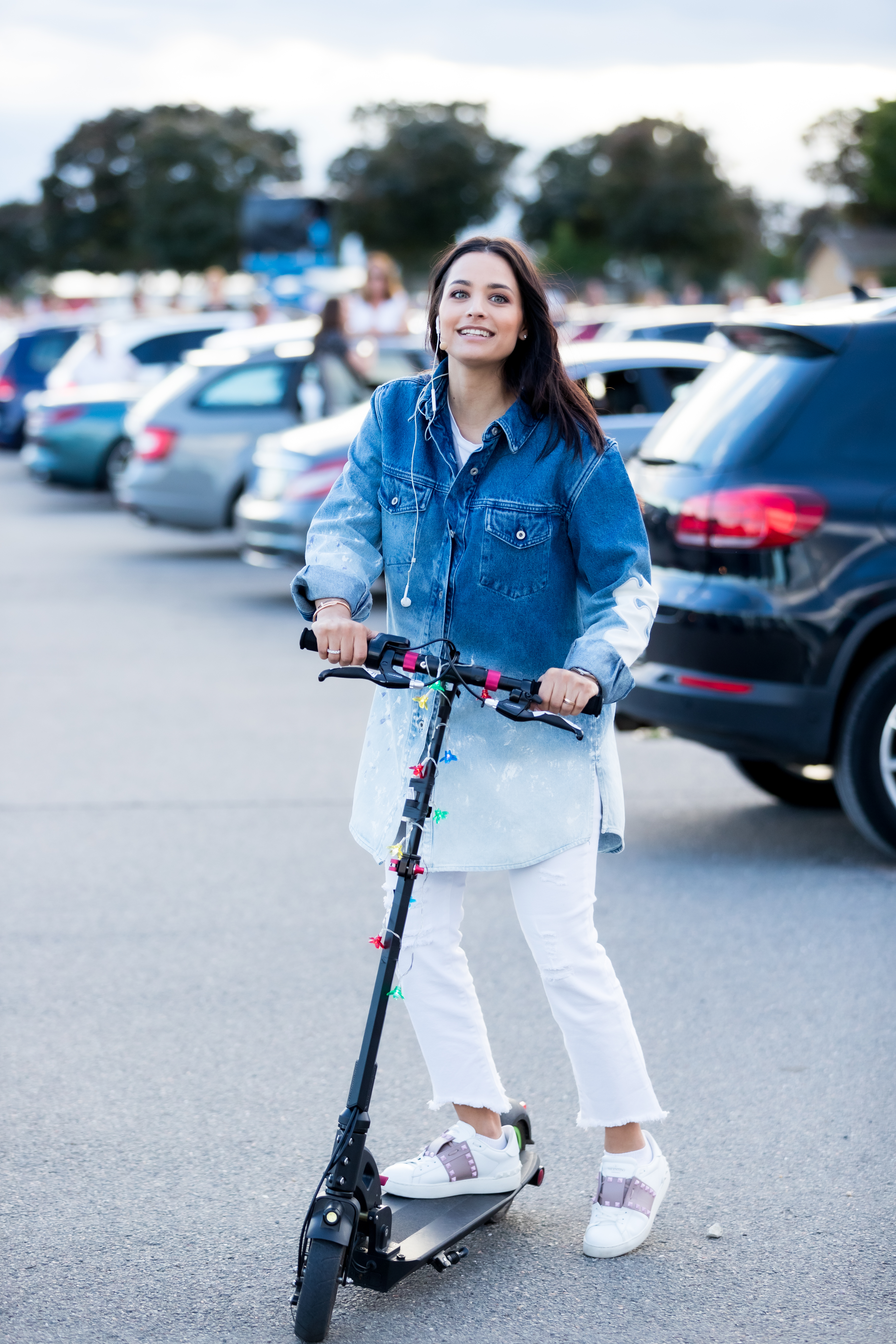 Die Pochers hier! during CARStival at Maimarktgelände, Mannheim, Baden-Württemberg, Germany on 2020-07-05, Photo: Sven Mandel Promotion: go7.ag